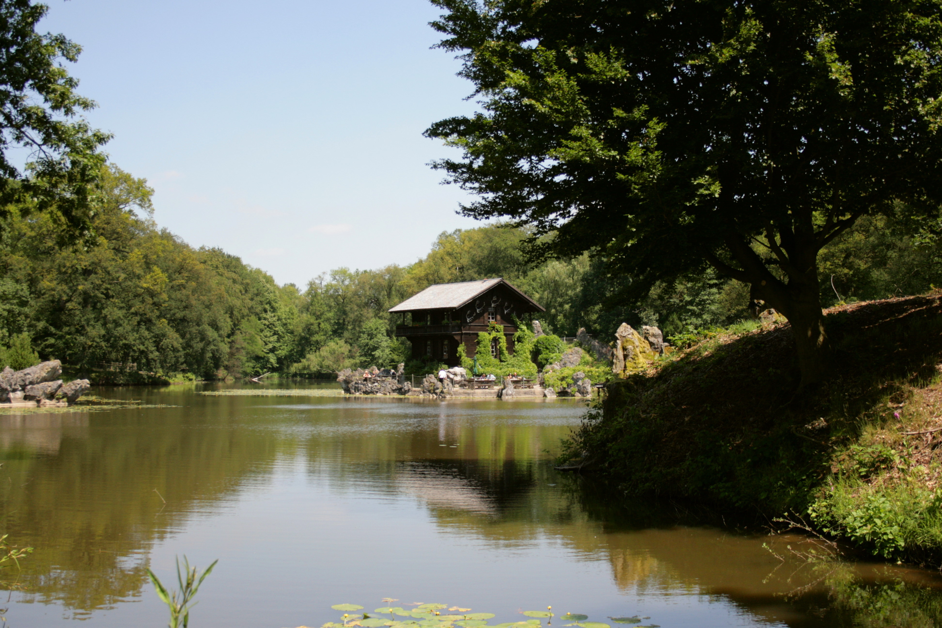 Schweizer Häuschen in der Anholter Schweiz in Anholt, Isselburg